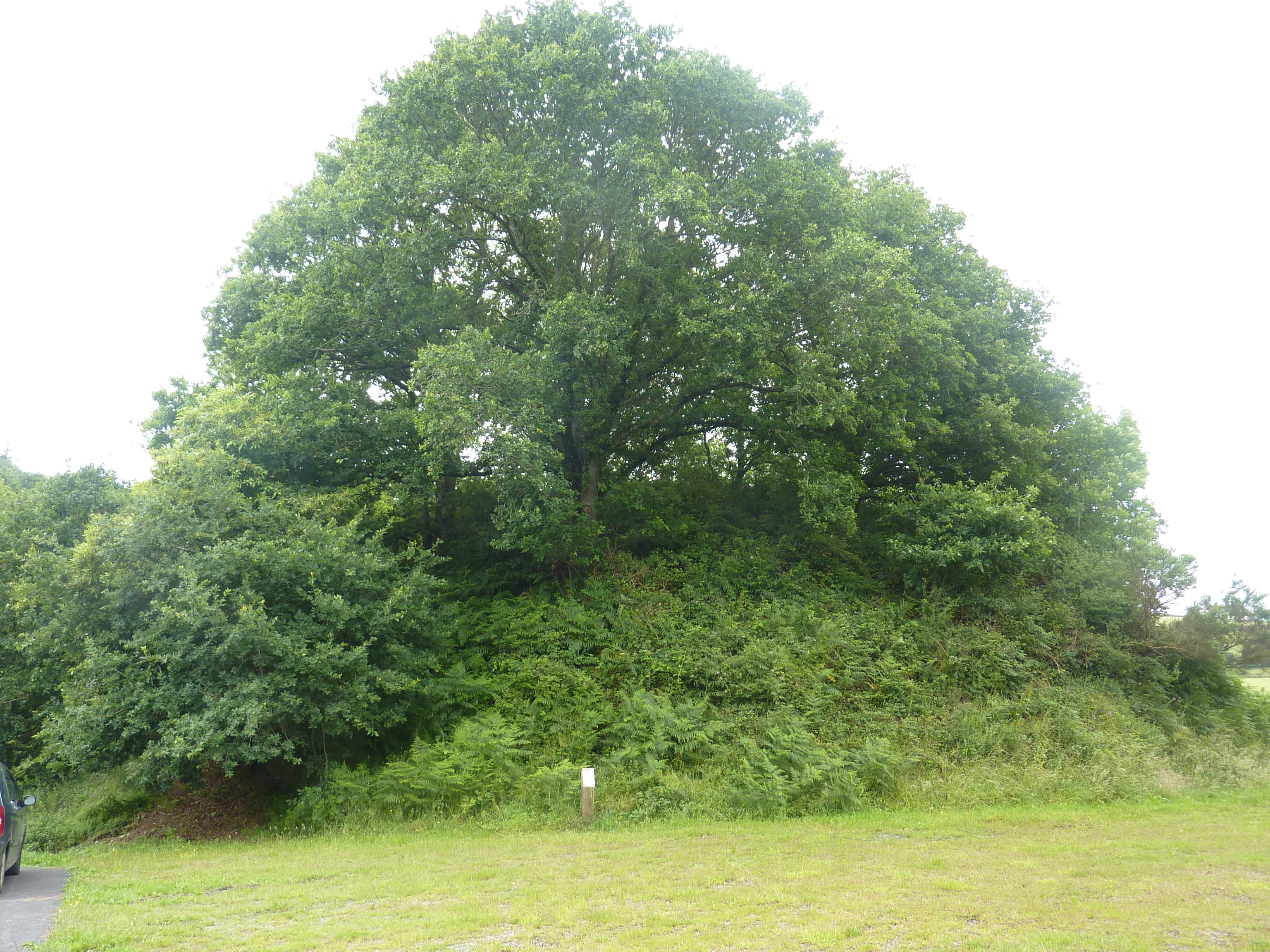 Cléden-Poher : la motte castrale de La Roche .